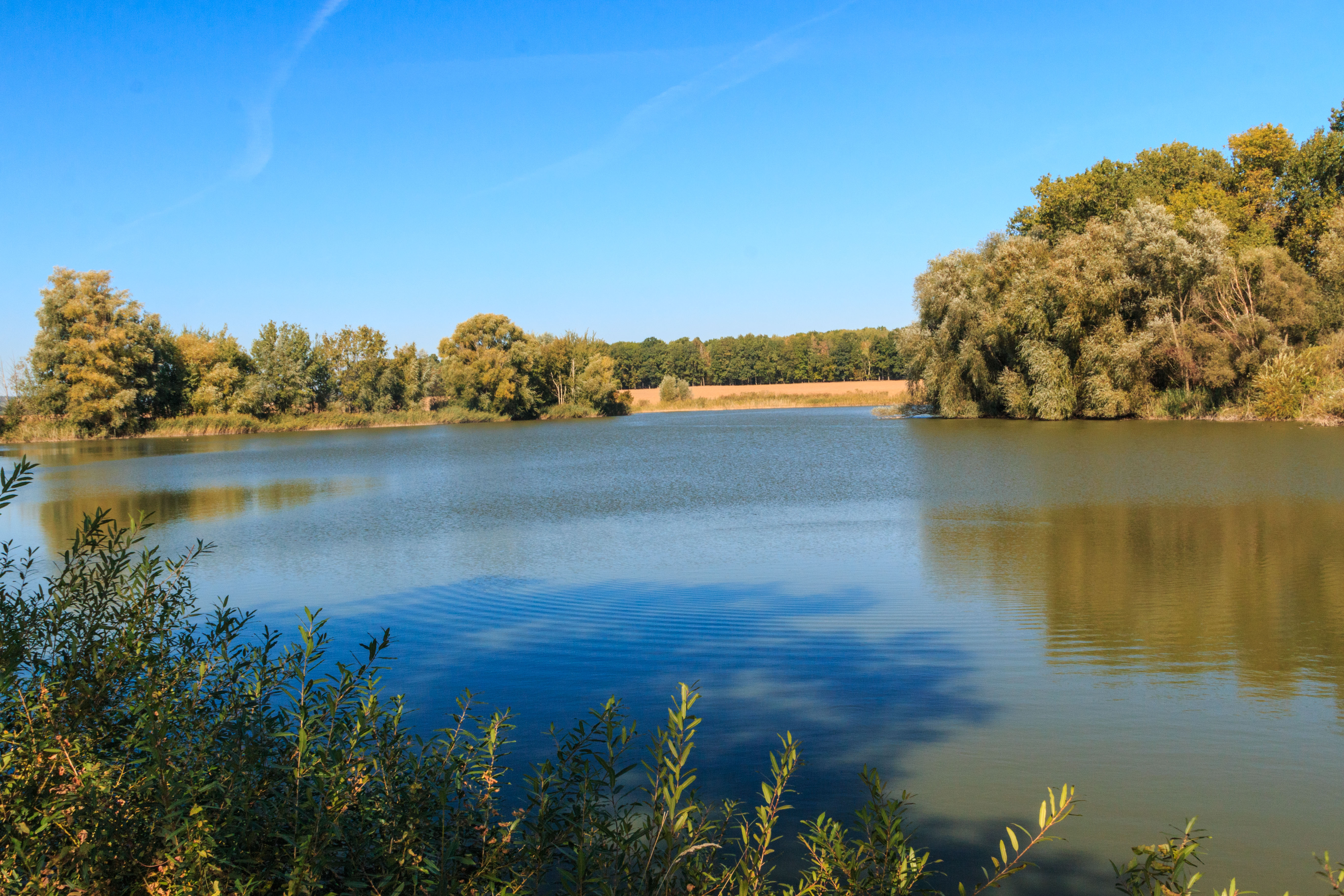 Rybník Pátek v Budě u Bakova Project: Vodstvo.